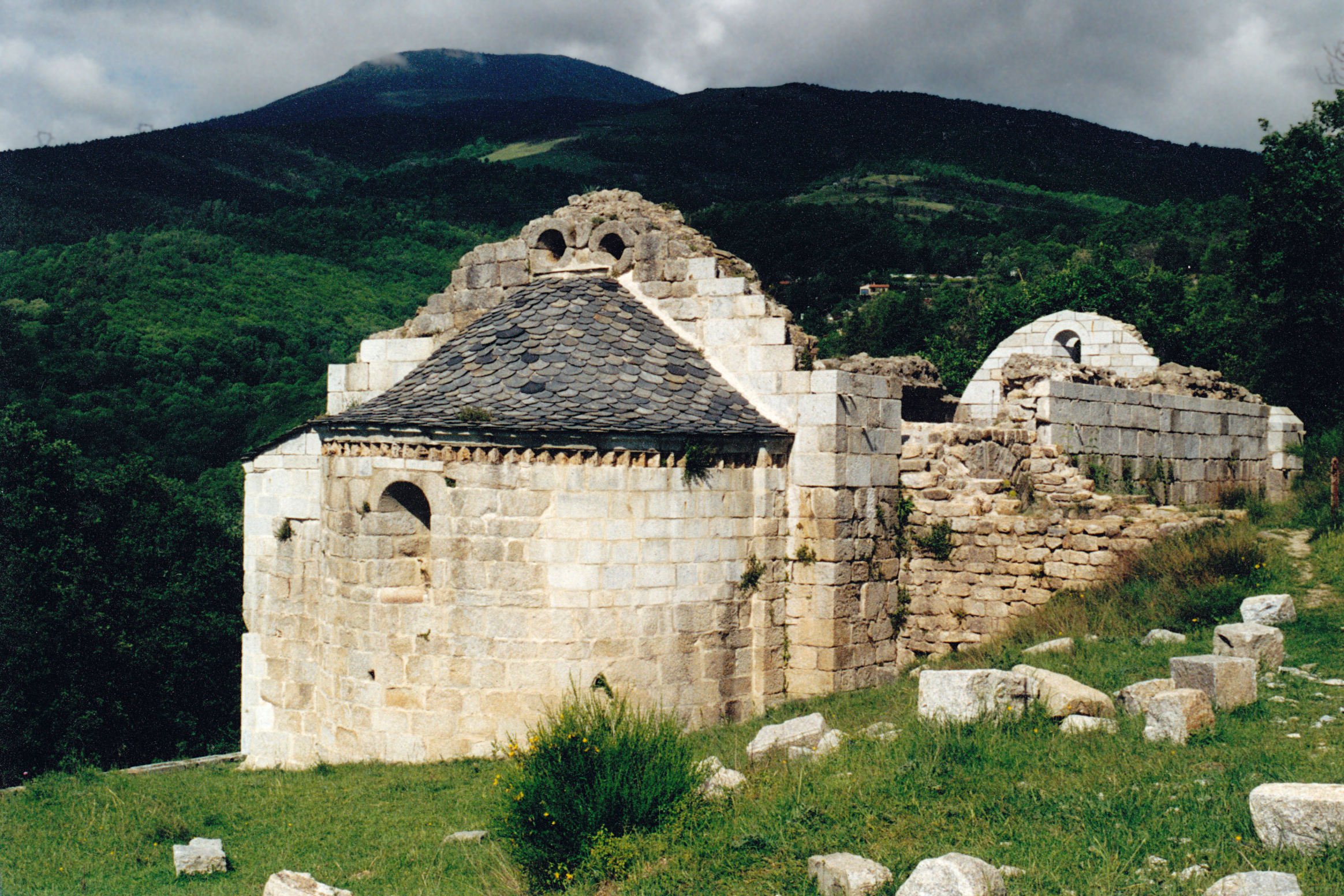 France - Pyrénées Orientales - Vallespir - Église Saint-Martin de Corsavy